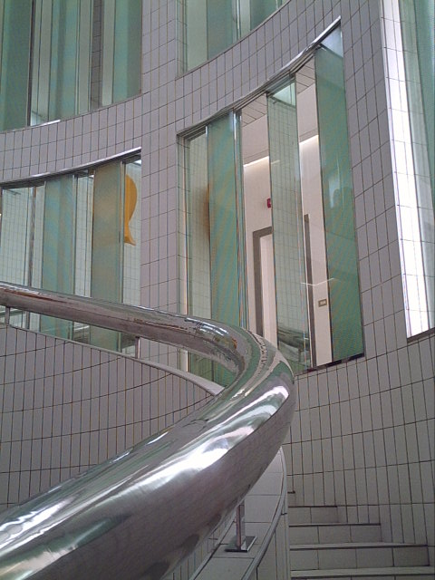 Casa museo Remo Brindisi This is a photo of a monument which is part of cultural heritage of Italy.